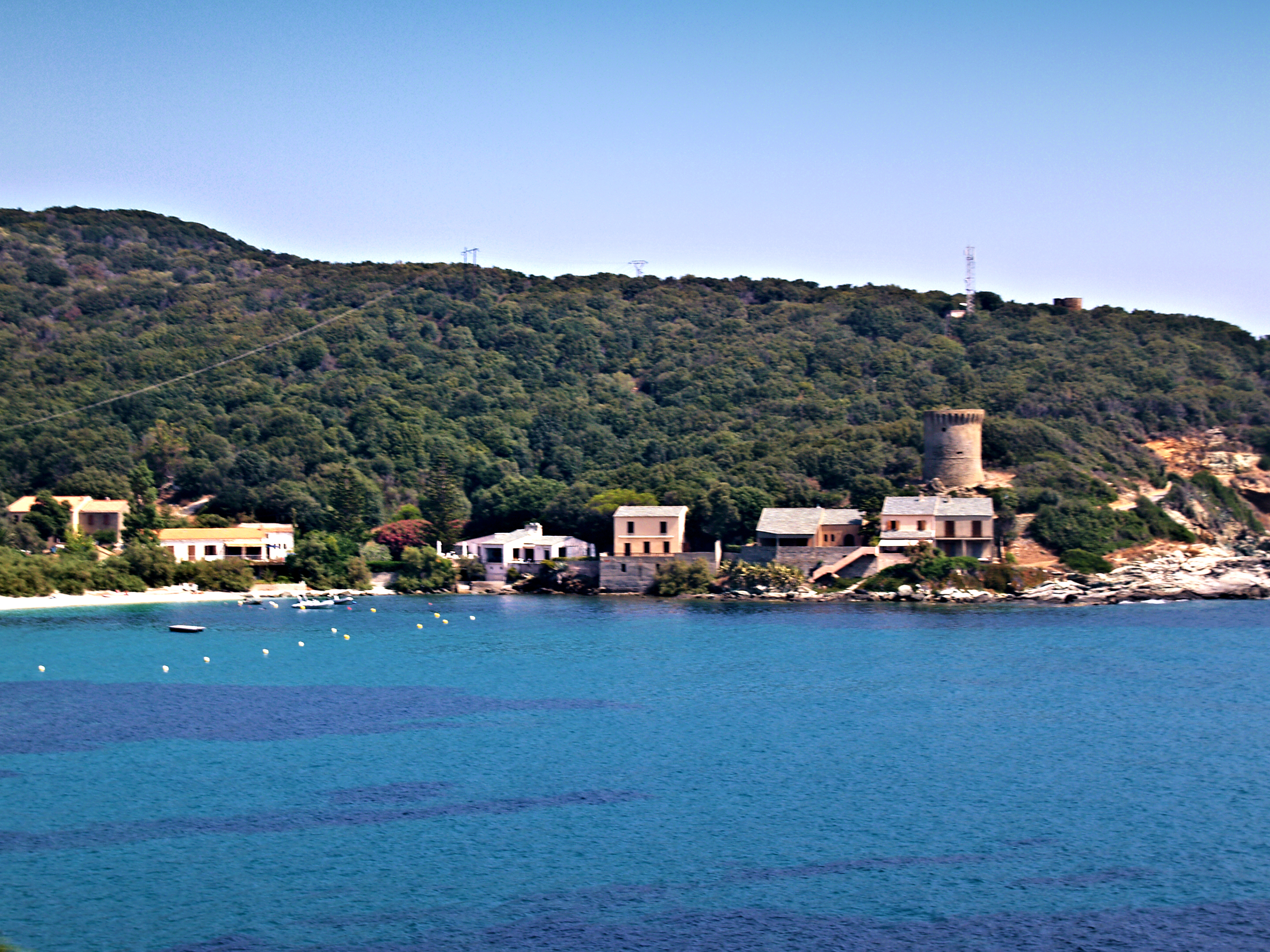 Meria (Corse) - La Marine de Meria